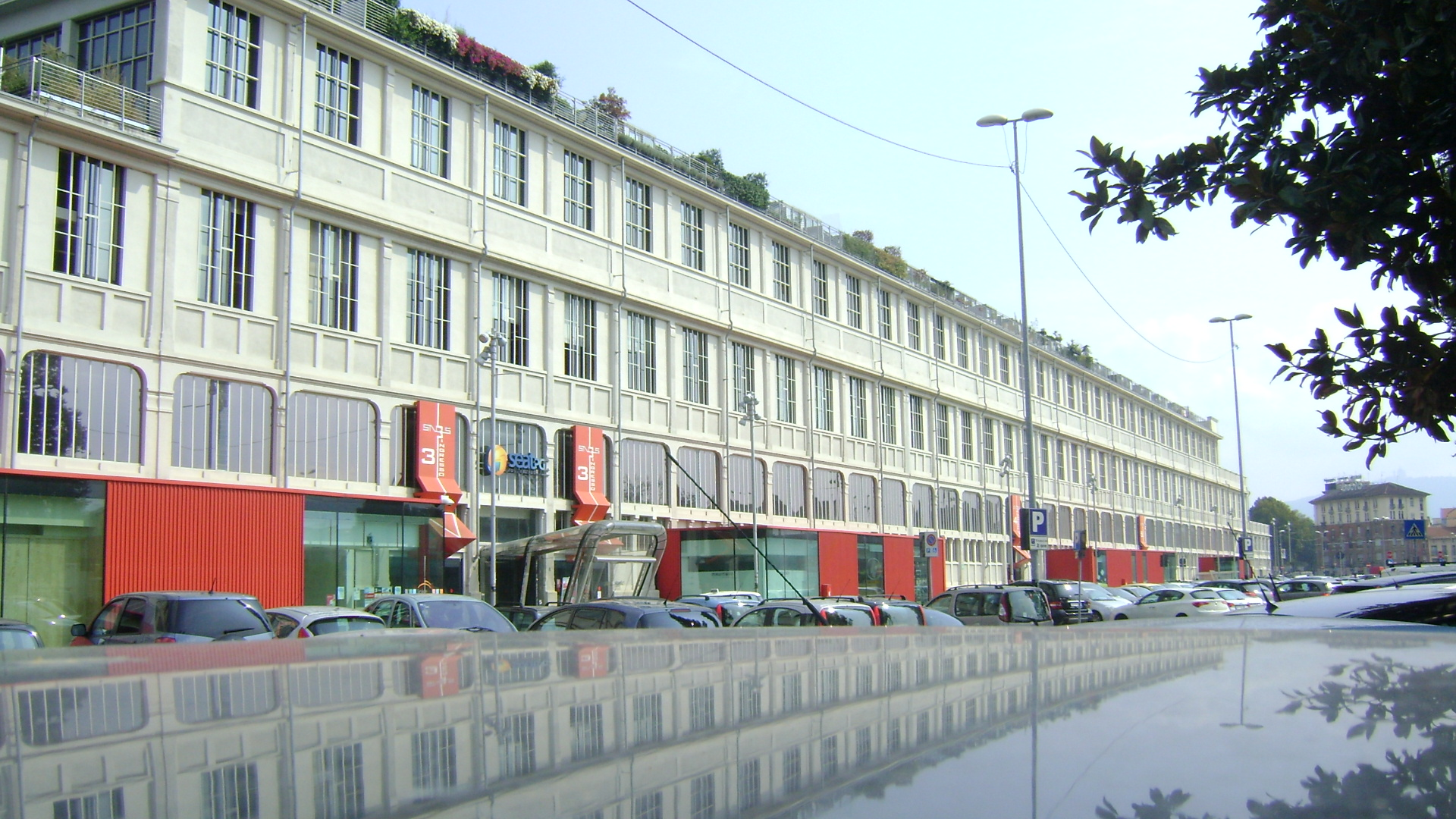 Ex Officine Savigliano, adesso sede dello SNOS Gallery Centre